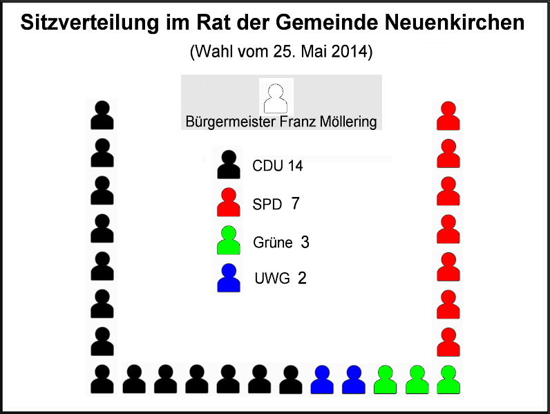 Sitzverteilung im Rat der Gemeinde Neuenkirchen (Kreis Steinfurt) nach der Kommunalwahl vom 25. Mai 2014